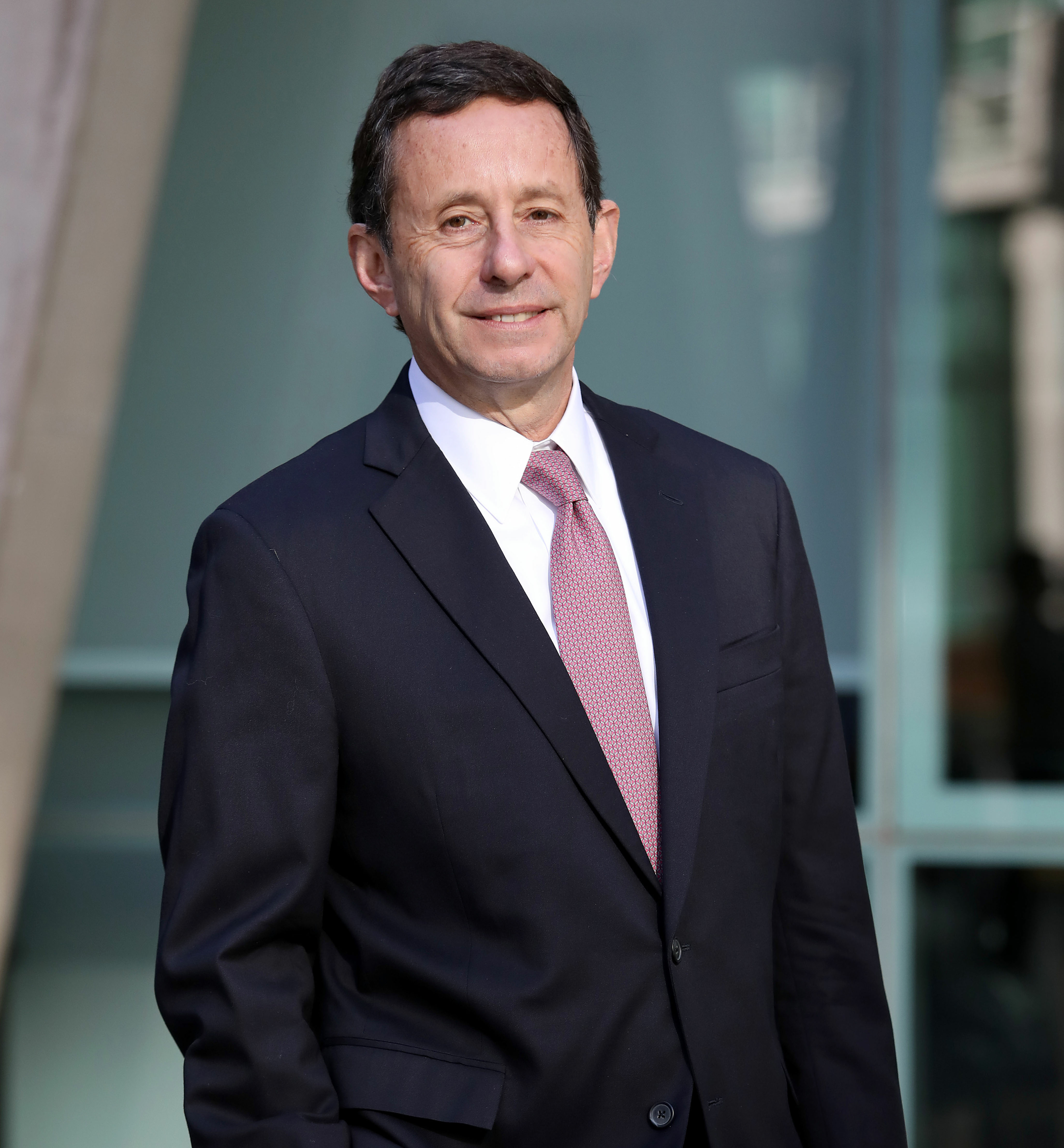 Foto Decano FEN 2018-2022